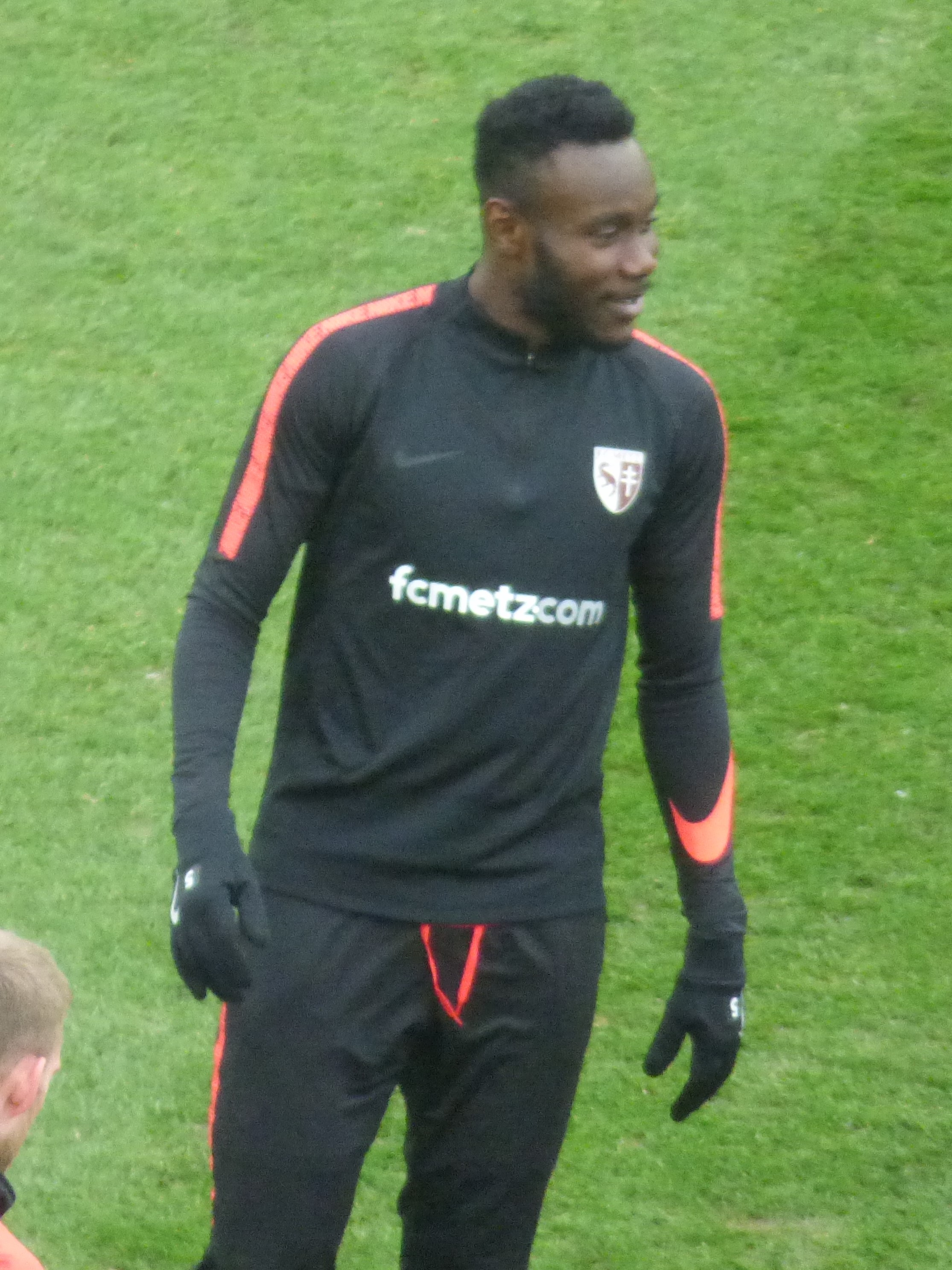 Victorien Angban avant le match RC Lens / FC Metz, comptant pour la vingt-quatrième journée du championnat de France de Ligue 2 2018-2019, le 9 février 2019, au Stade Bollaert-Delelis.